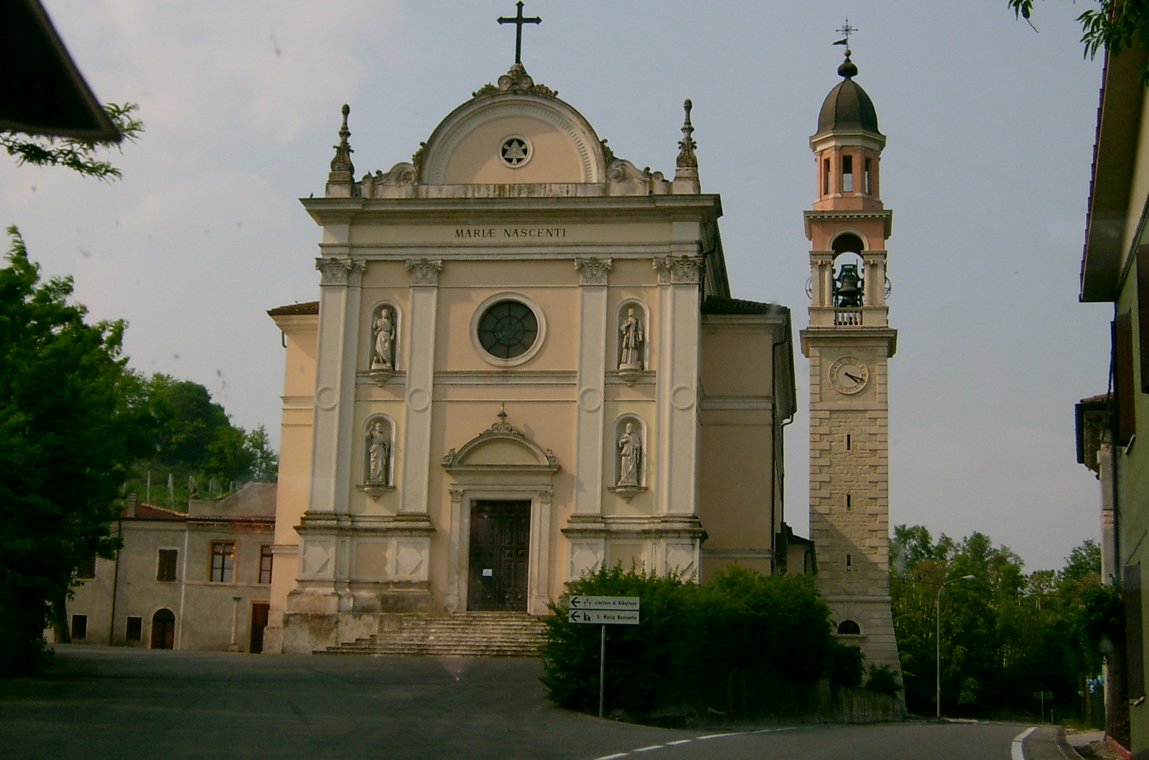 La chiesa di Santa Maria Nascente ad Albettone. CapPixel (07/05/2006)